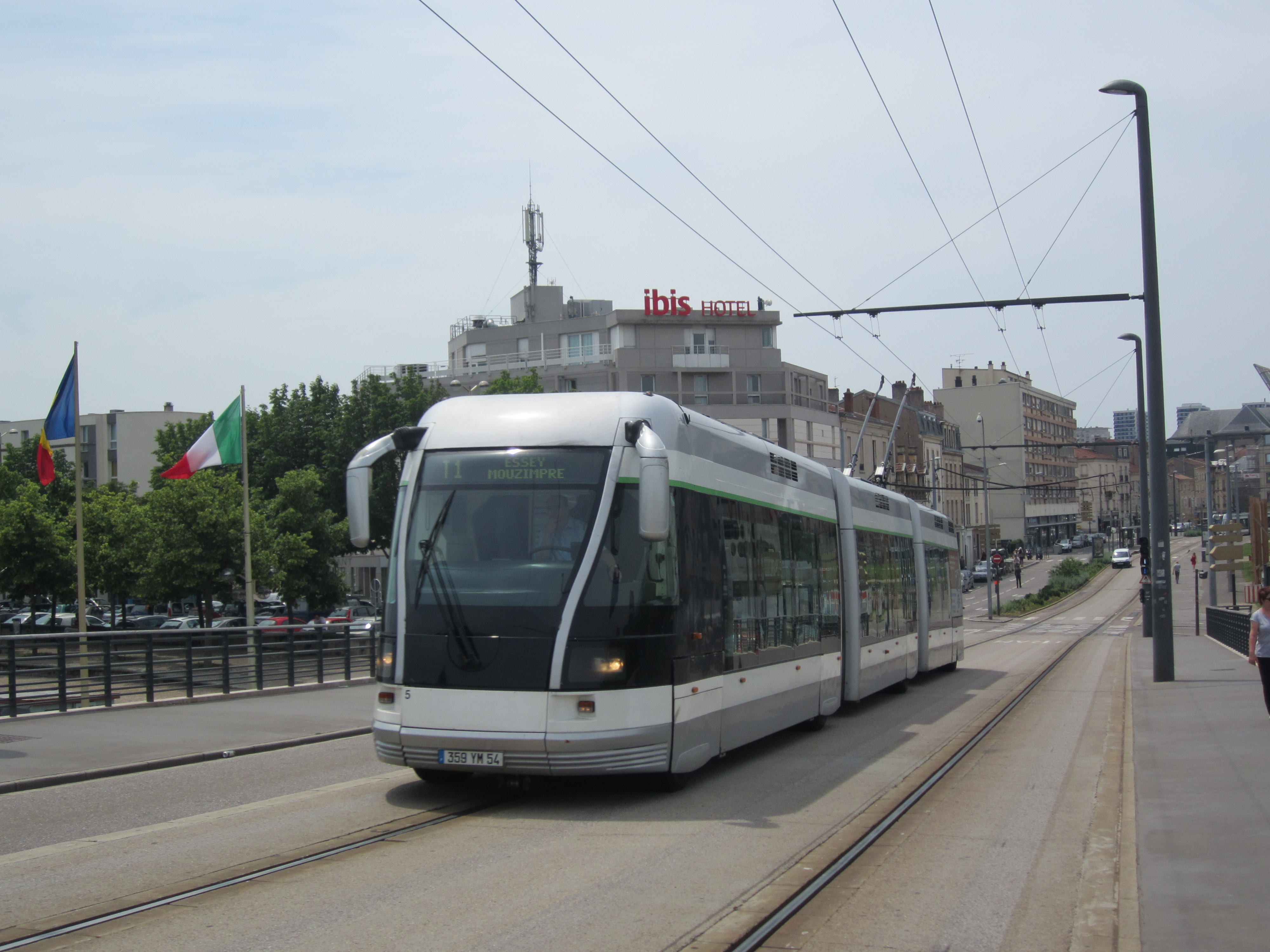 Bombardier TVR n°05 STAN sur la ligne T1, quittant l'arrêt Division de Fer en direction d'Essey Mouzimpré.